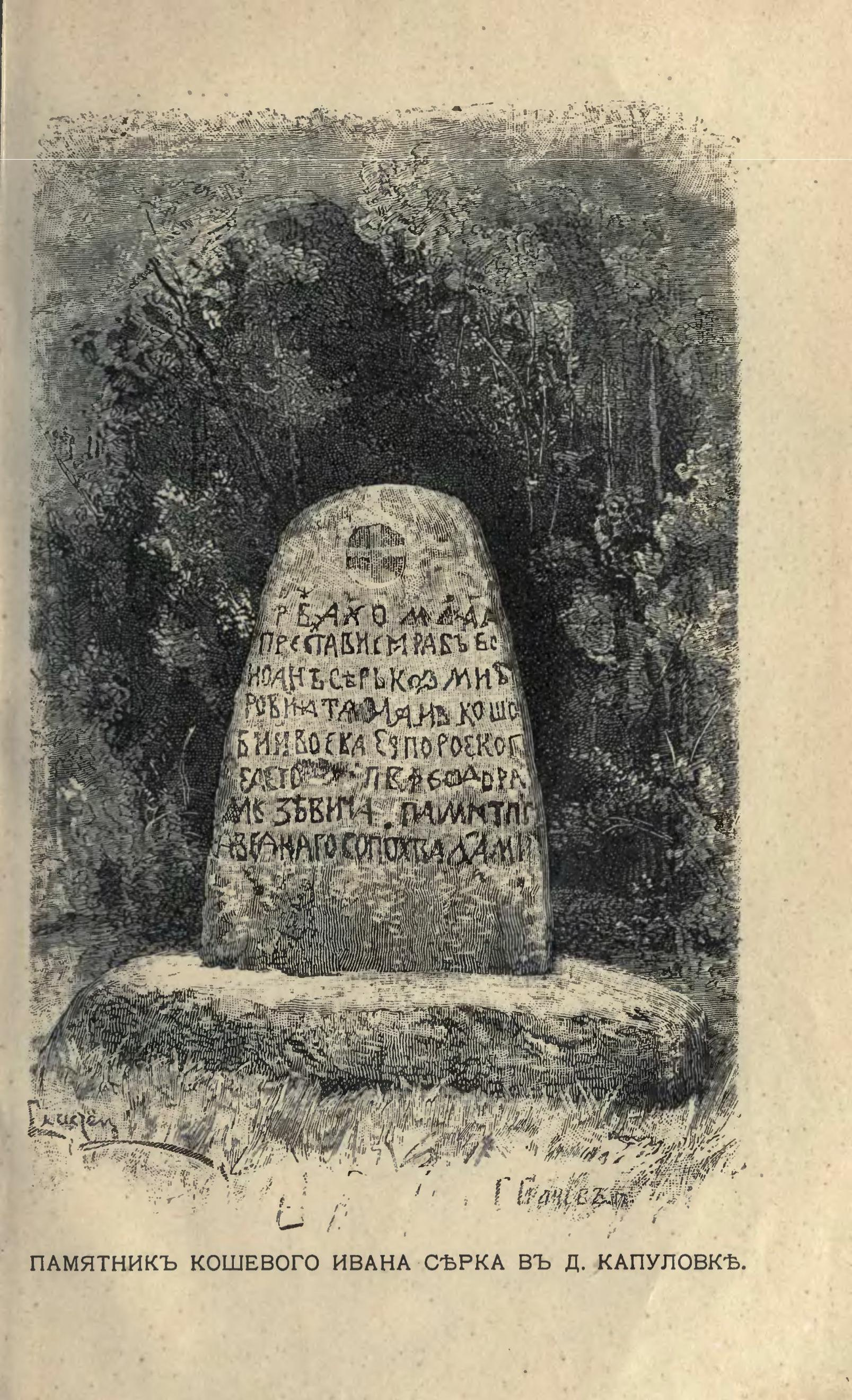 Пам'ятник кошовому Івану Сірку (біля села Капулівка)